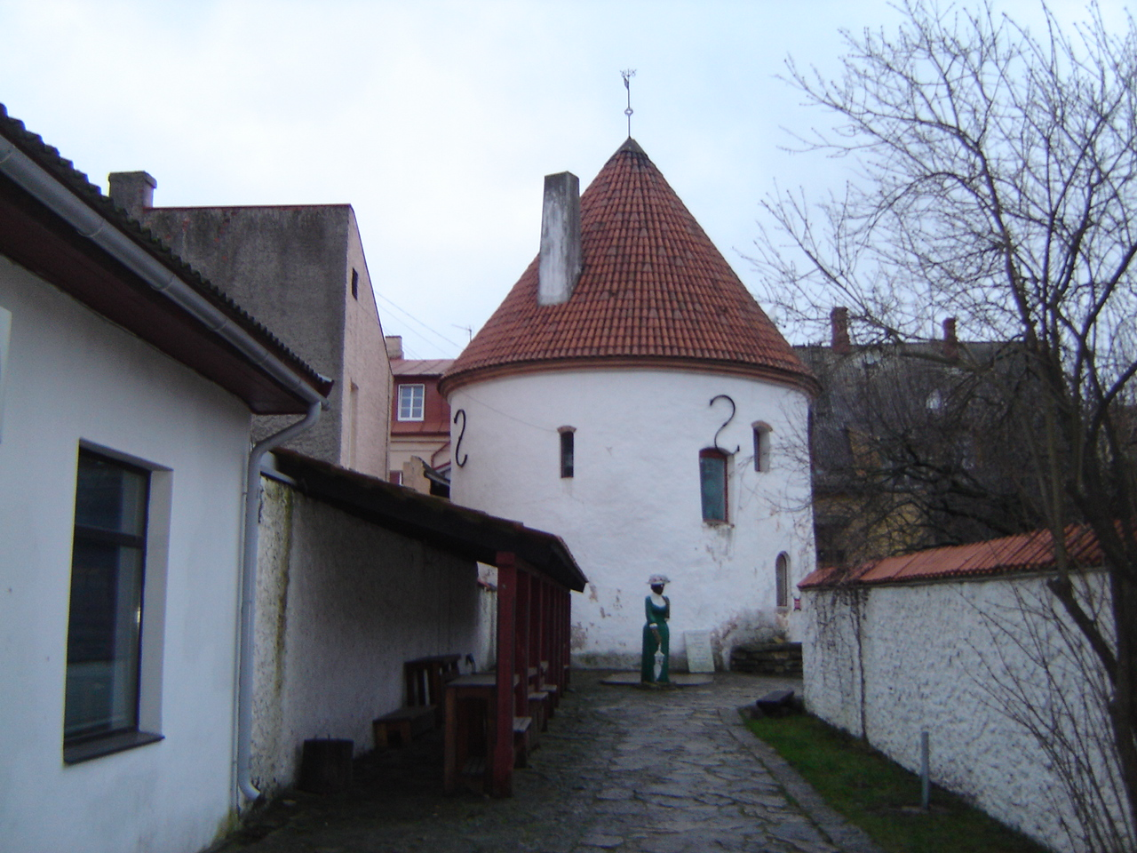 Pärnu ordulinnuse vangitorn. Punane torn